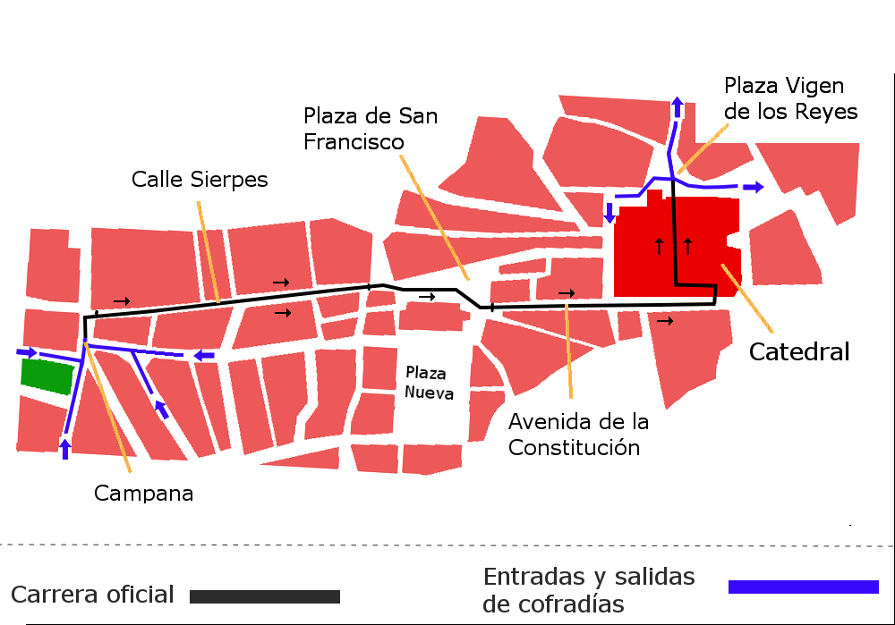 Croquis en el que se muertra el recorrido de las hermandades por la Carrera Oficial de la Semana Santa en Sevilla (España).